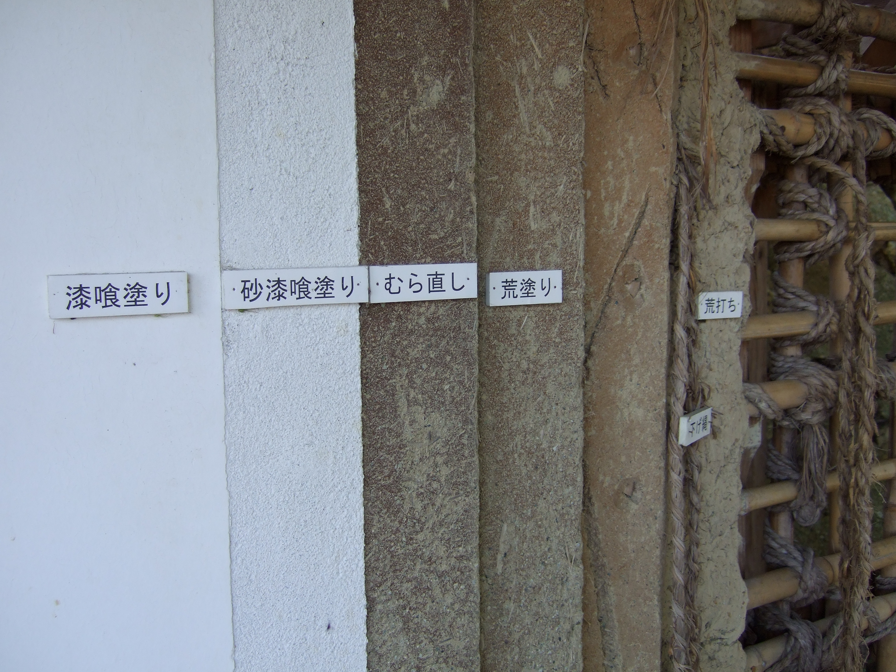 津山市山下 鶴山公園